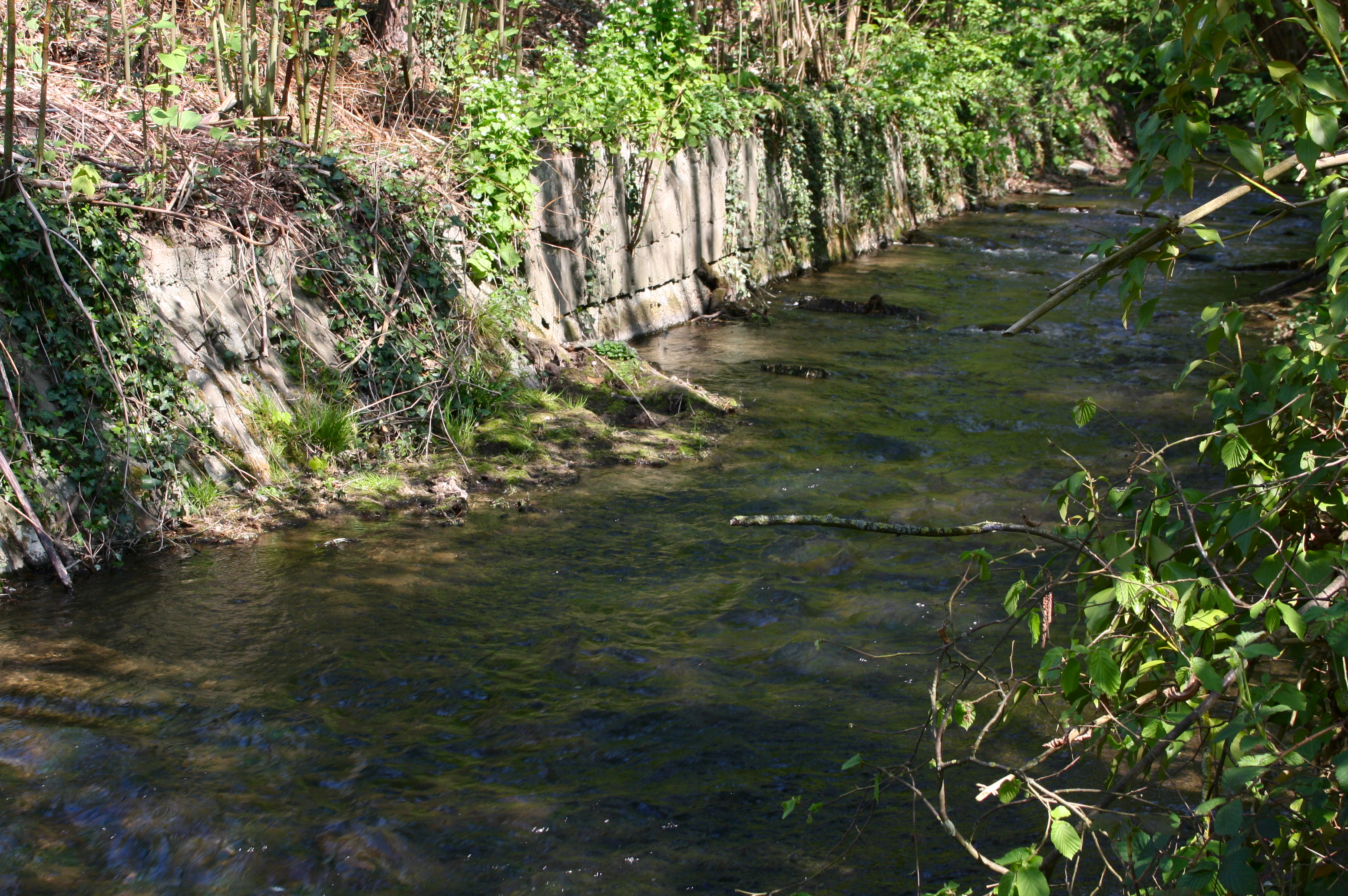 Der Hillscheider Bach (Leerbach) in Vallendar, Rheinland-Pfalz, Deutschland